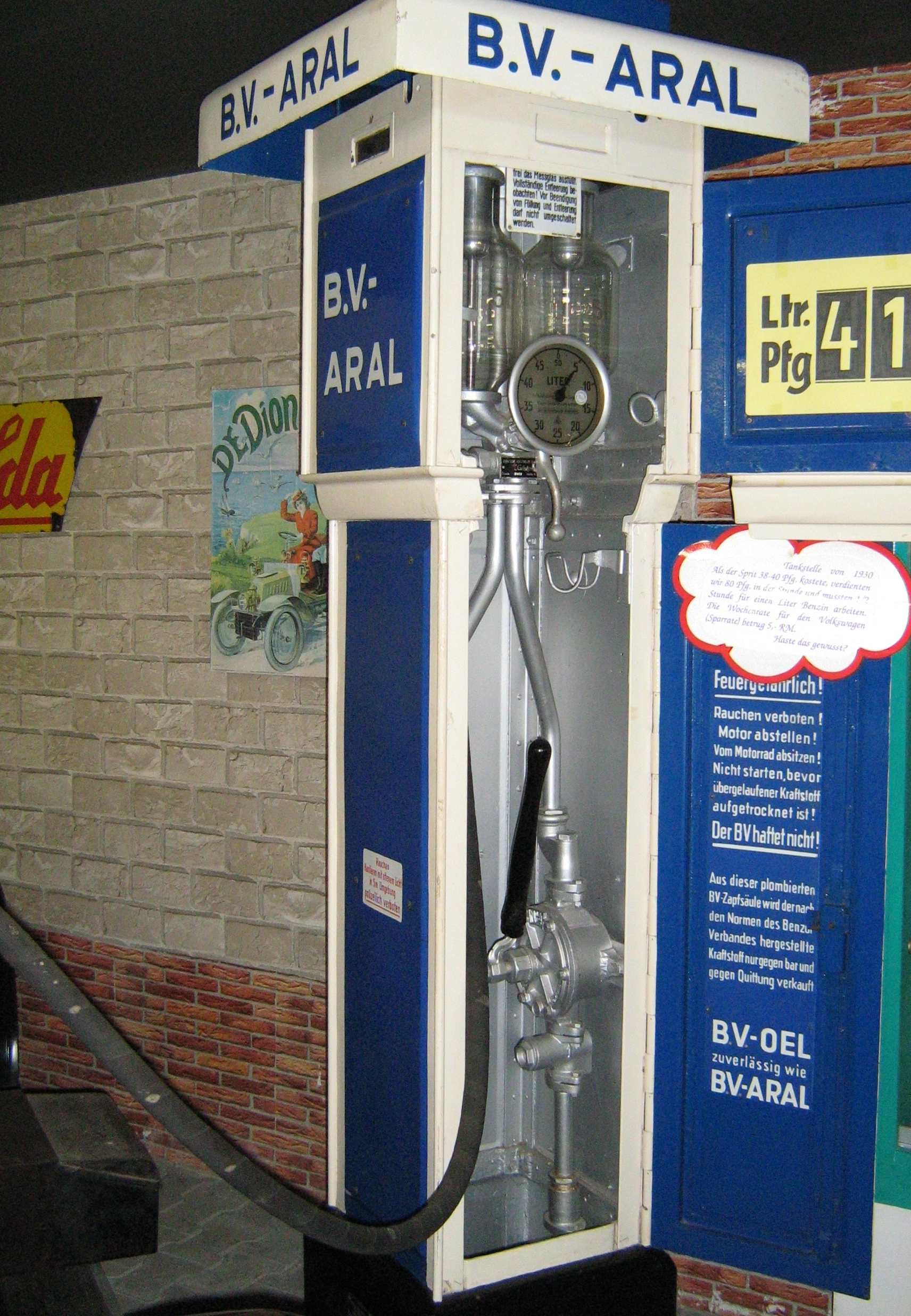 Aral Tankstelle mit Handpumpe von 1939